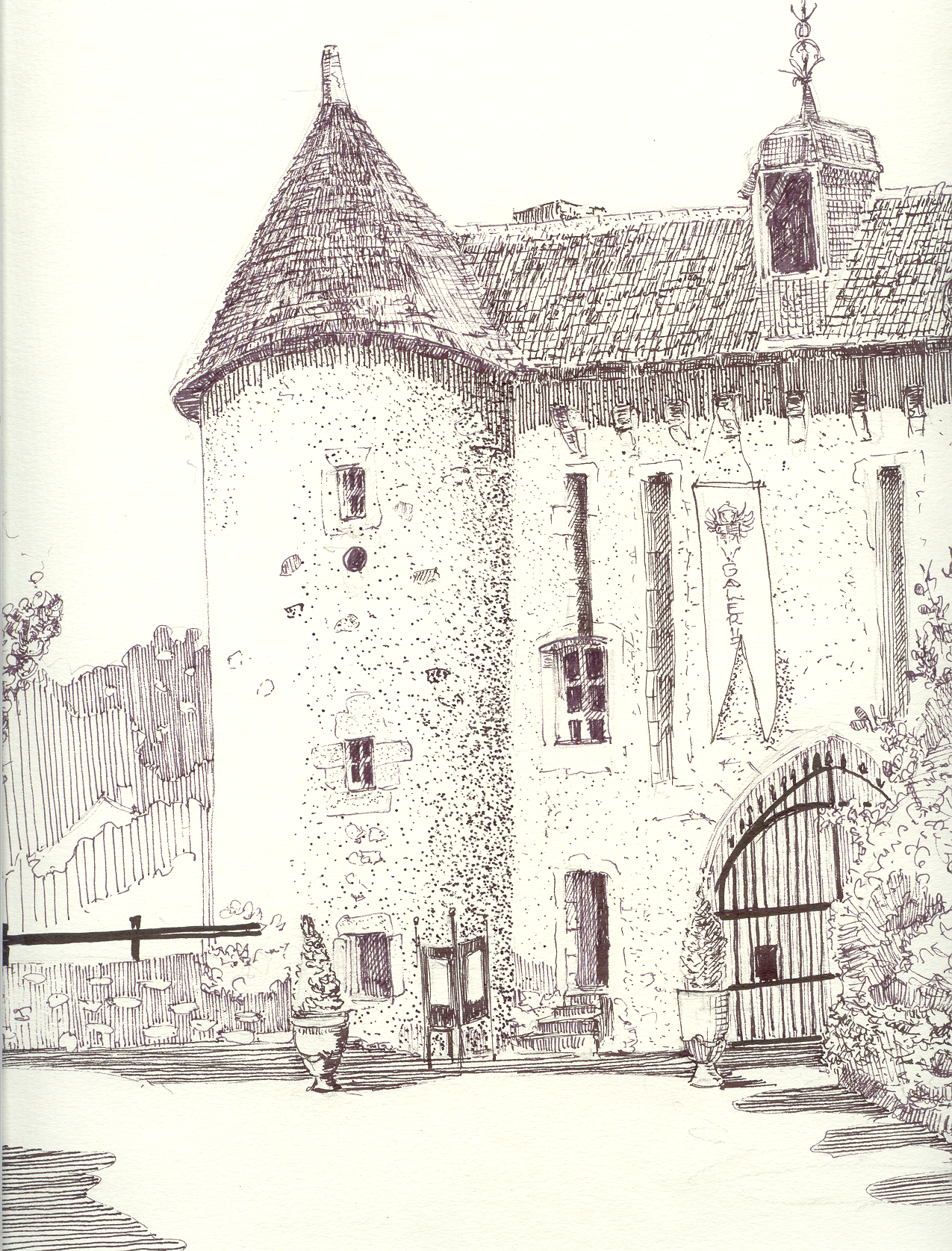 dessin a la plume du château de gargilesse auteur MICHEL MANS Utilisateur:Michel mans